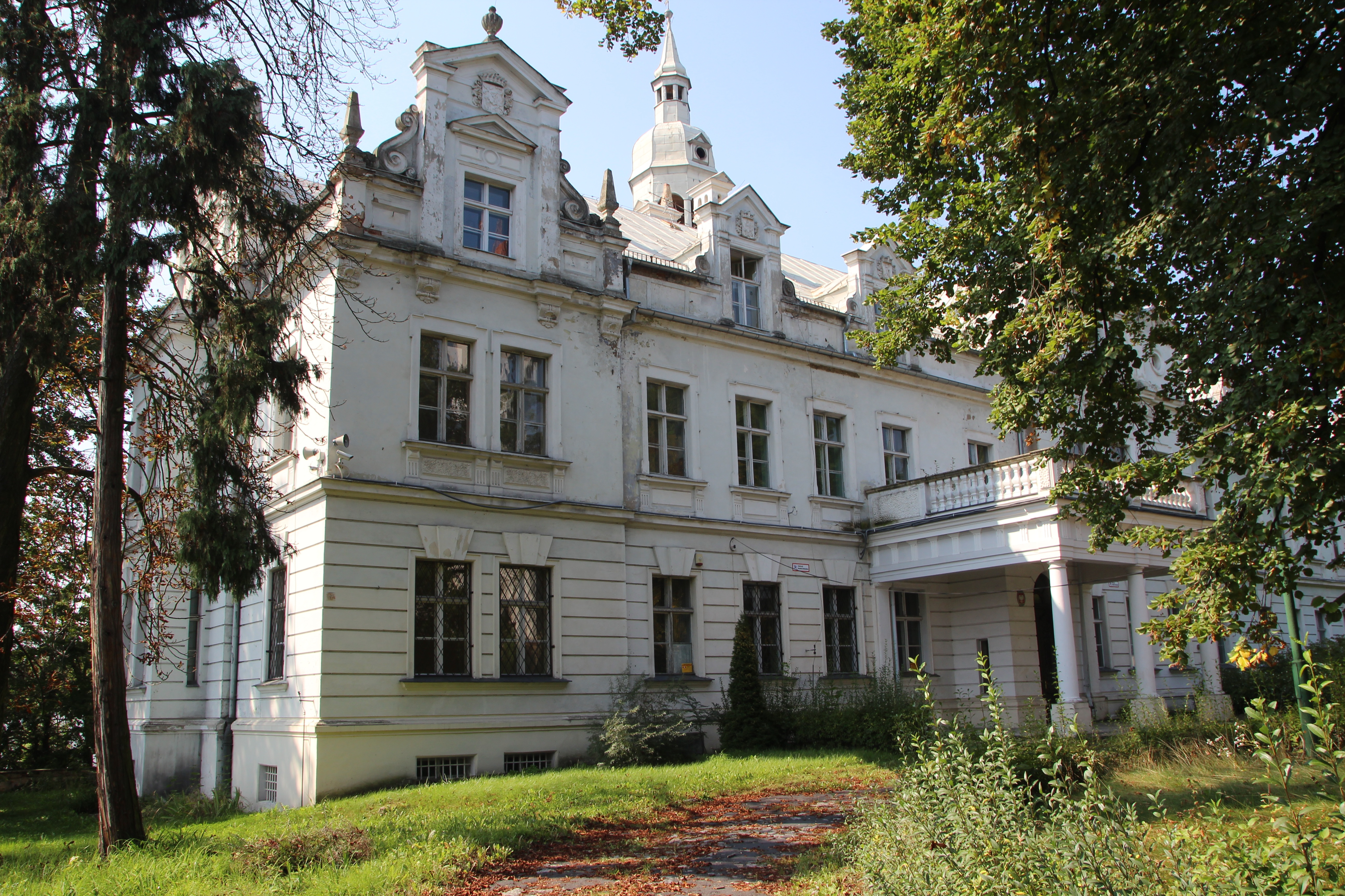 Biechów – pałac, 1863-1865, 1904